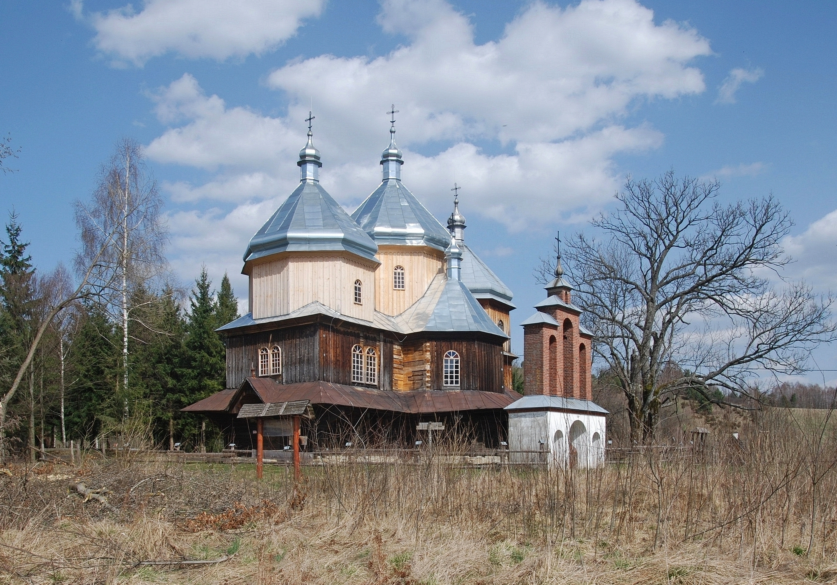 Bystre, Cerkiew św. Michała Archanioła w Bystrem Dane na ten temat są gromadzone w Wikidanych pod numerem Q9187750.